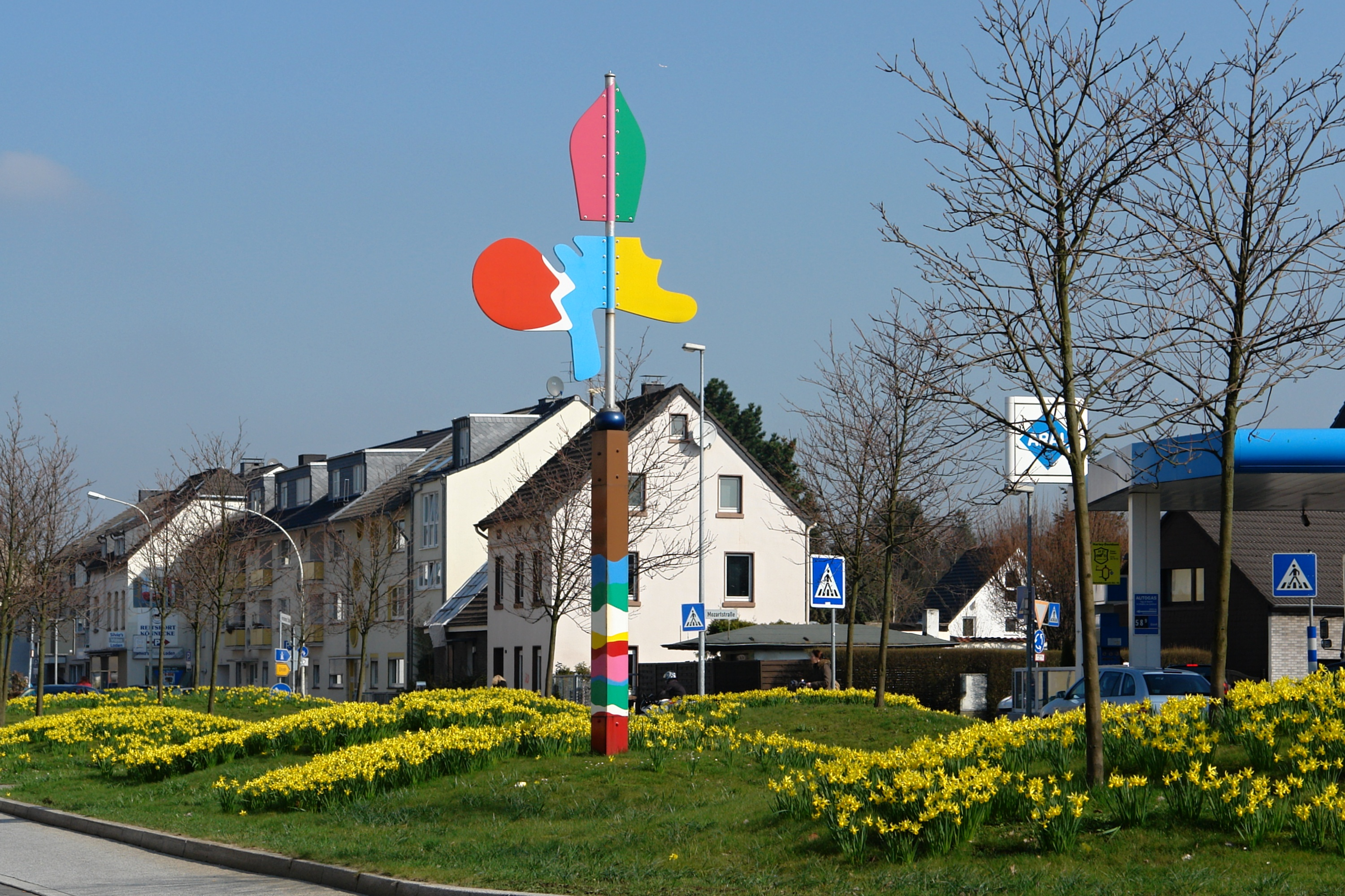 Kreisverkehr "Aldi-Ei" im Lauf der Gerresheimer Straße, Hilden, mit Windwegweiser (2002) der Künstlerin Inge Welsch (* 22. Juli 1935 in Nova Friburgo, Brasilien